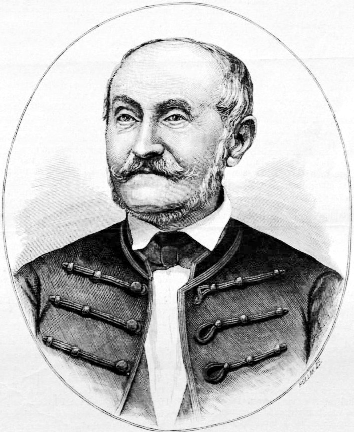 Somssich Pál (1811–1888) politikus, publicista, a képviselőház elnöke portréja. Pollák Zsigmond metszete Ellinger Ede fényképfelvétele alapján